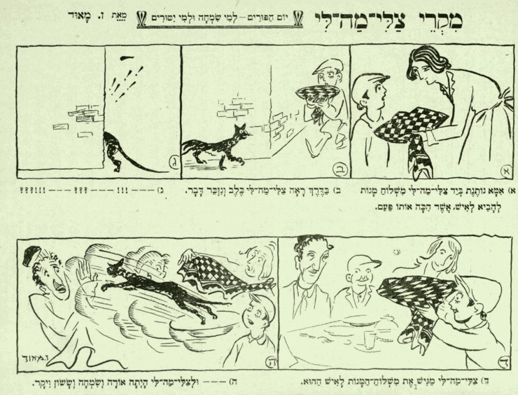 מדור קומיקס בעיתון "עדן", מרץ 1925